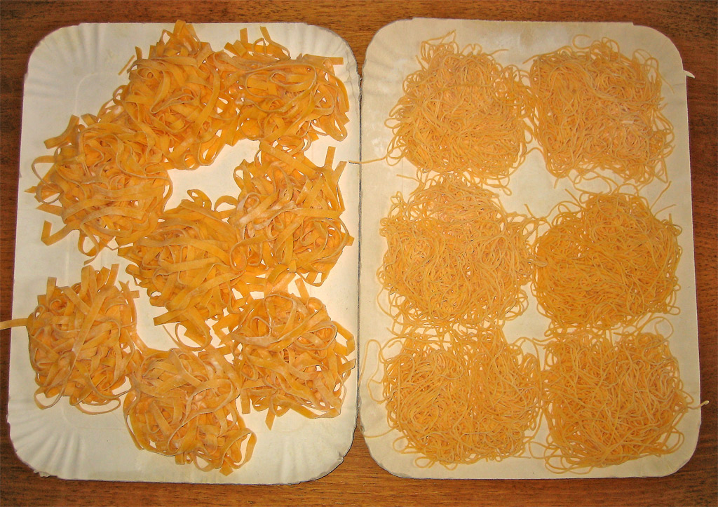 tagliatelle & capelli d'angelo punti di vista